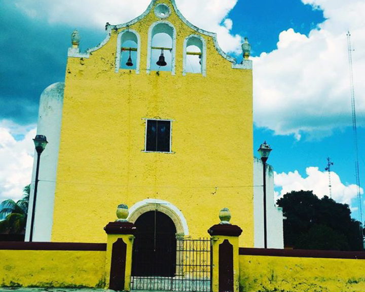 El templo el que se venera a Santo Tomás en Tunkás, Yucatán.